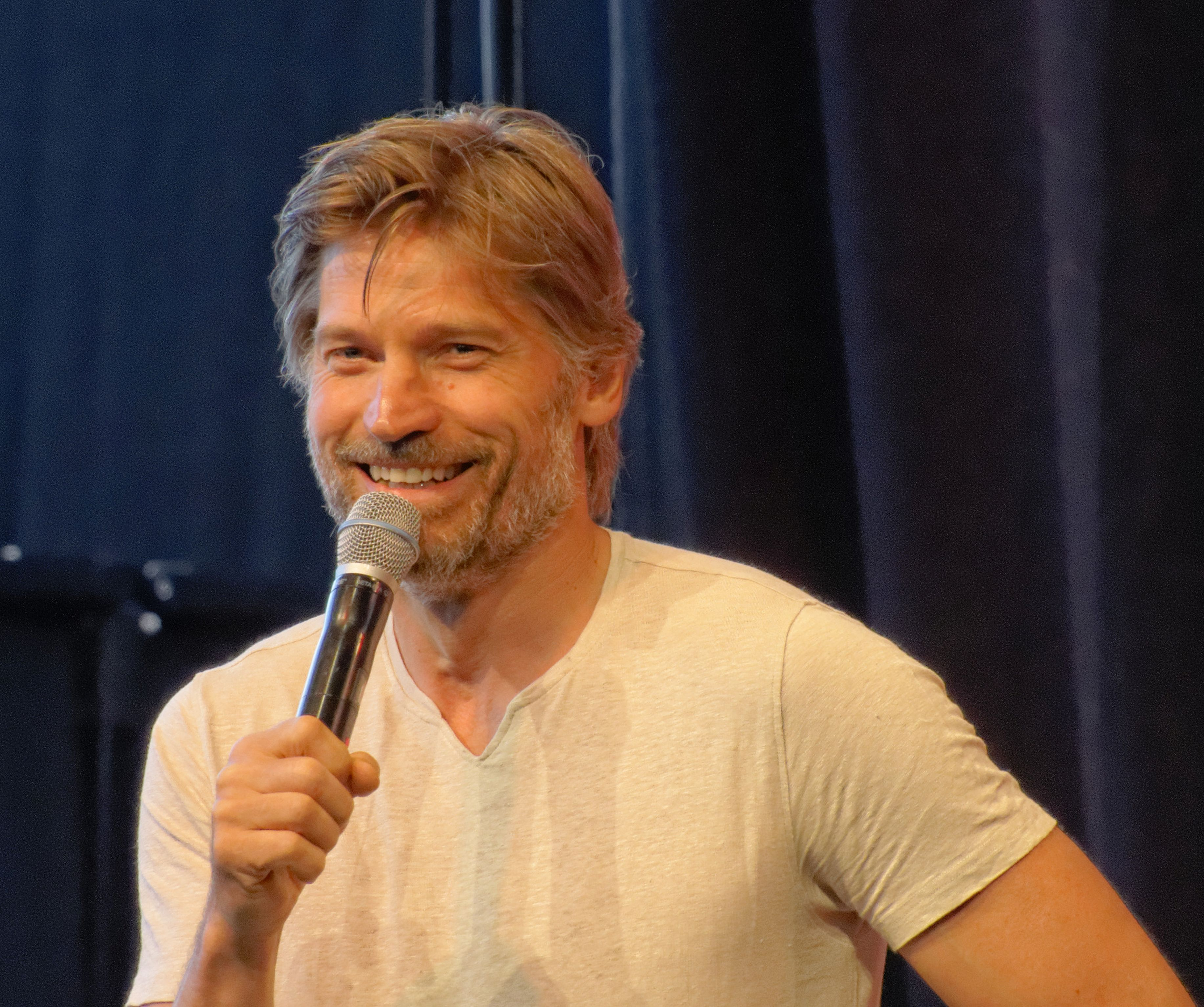 Bilder von der Comic Con Germany in Stuttgart 2018